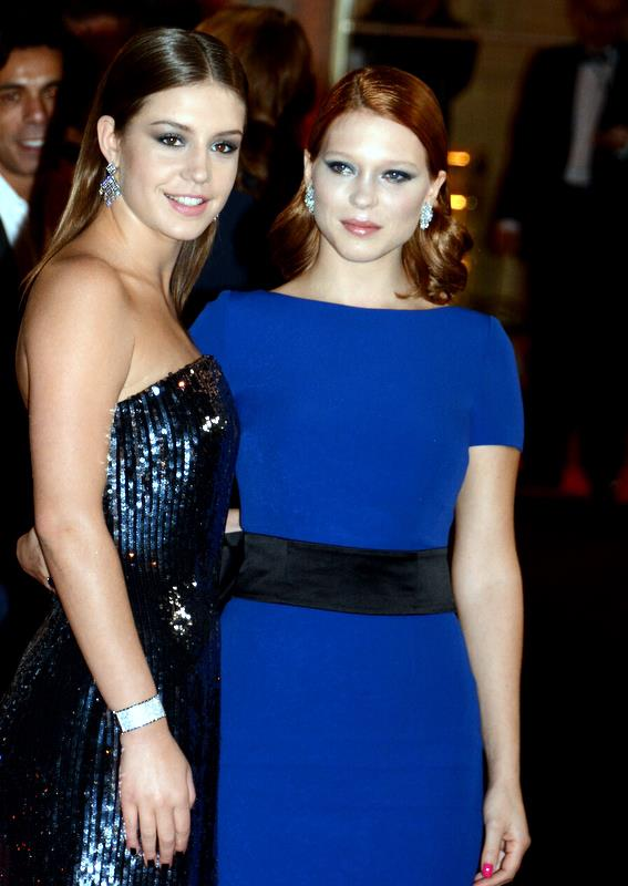 Léa Seydoux et Adèle Exarchopoulos à la cérémonie des César